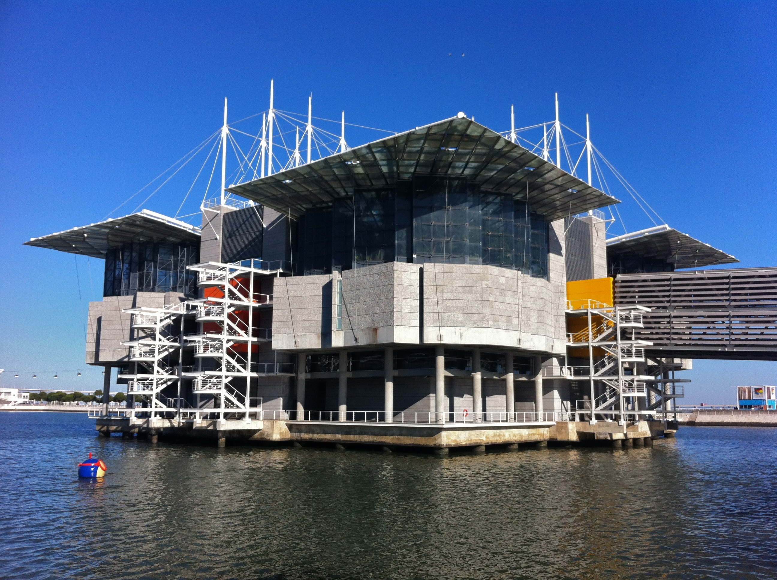 Oceanário de Lisboa - 45